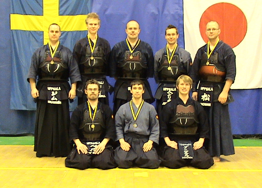 SM-medalj till UKK 2005.